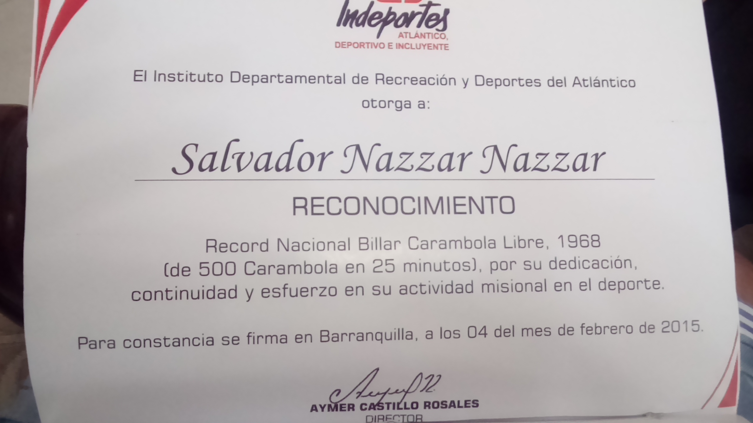 Certificado del Record